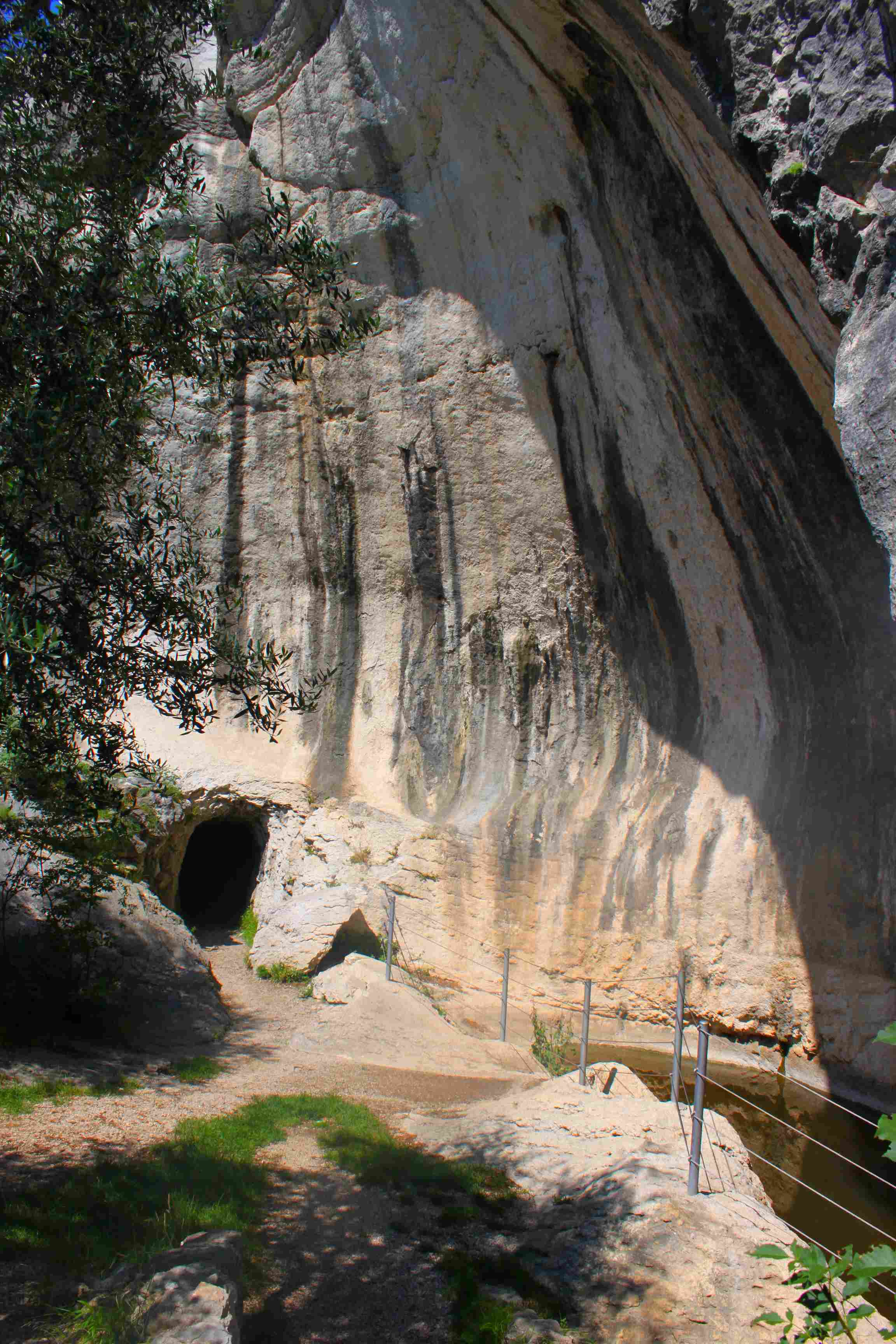 Die Gletschermühlen Marmitte dei Giganti sind in der Eiszeit durch Gletscherschmelzwasser entstanden